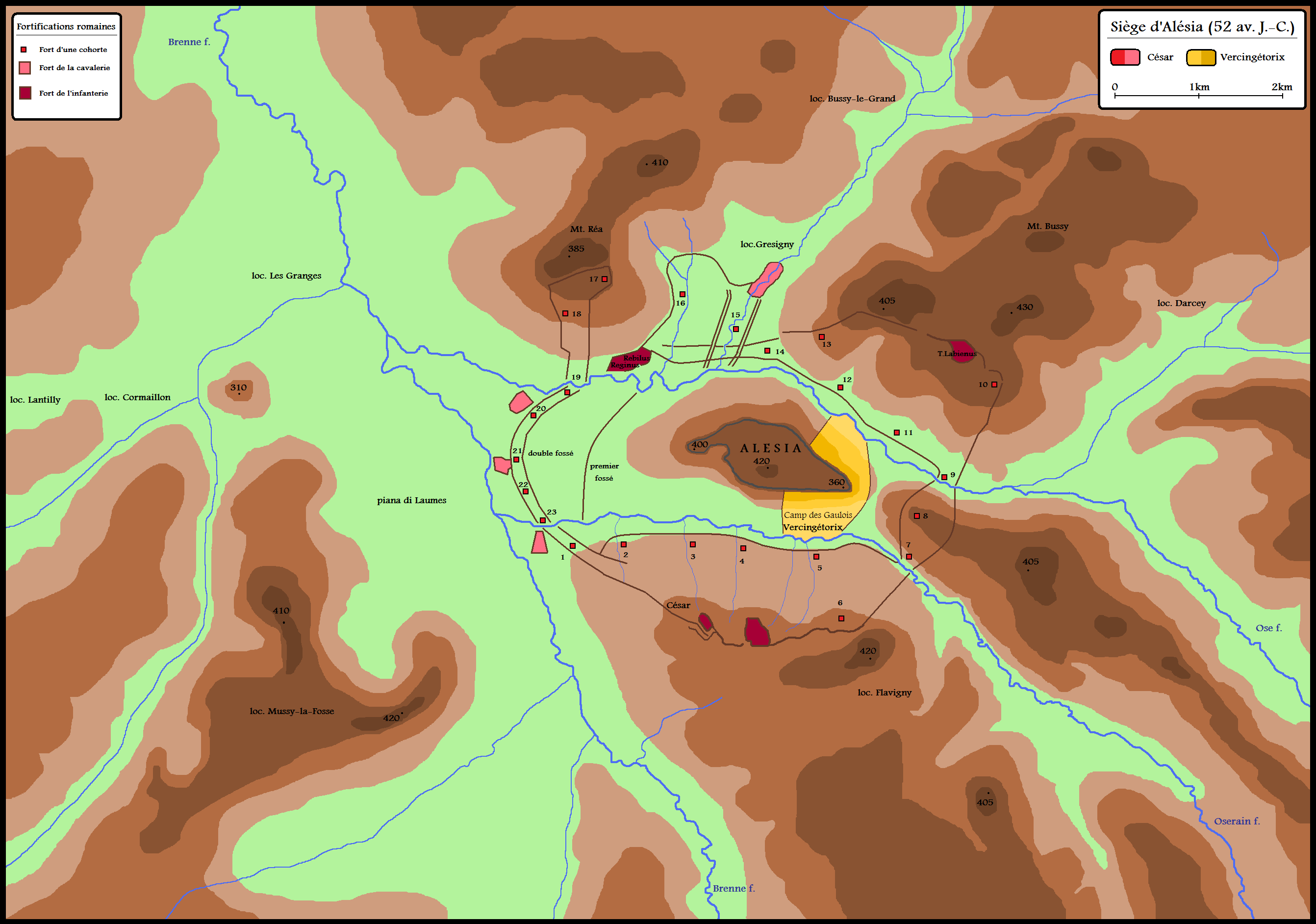 Siège d'Alésia par César contre Vercingétorix en 52 av. J.-C.